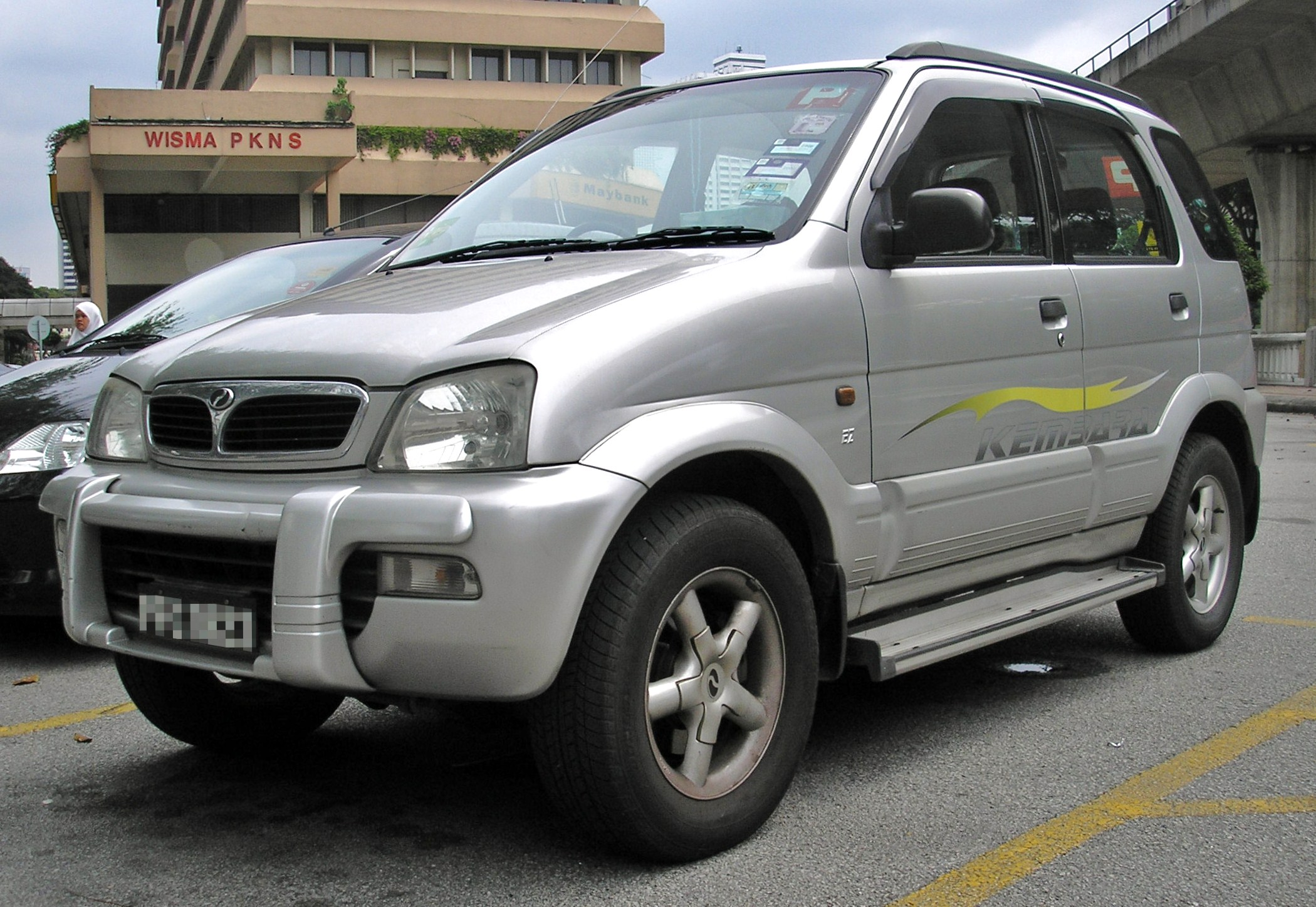 A Perodua Kembara in Kuala Lumpur, Malaysia.